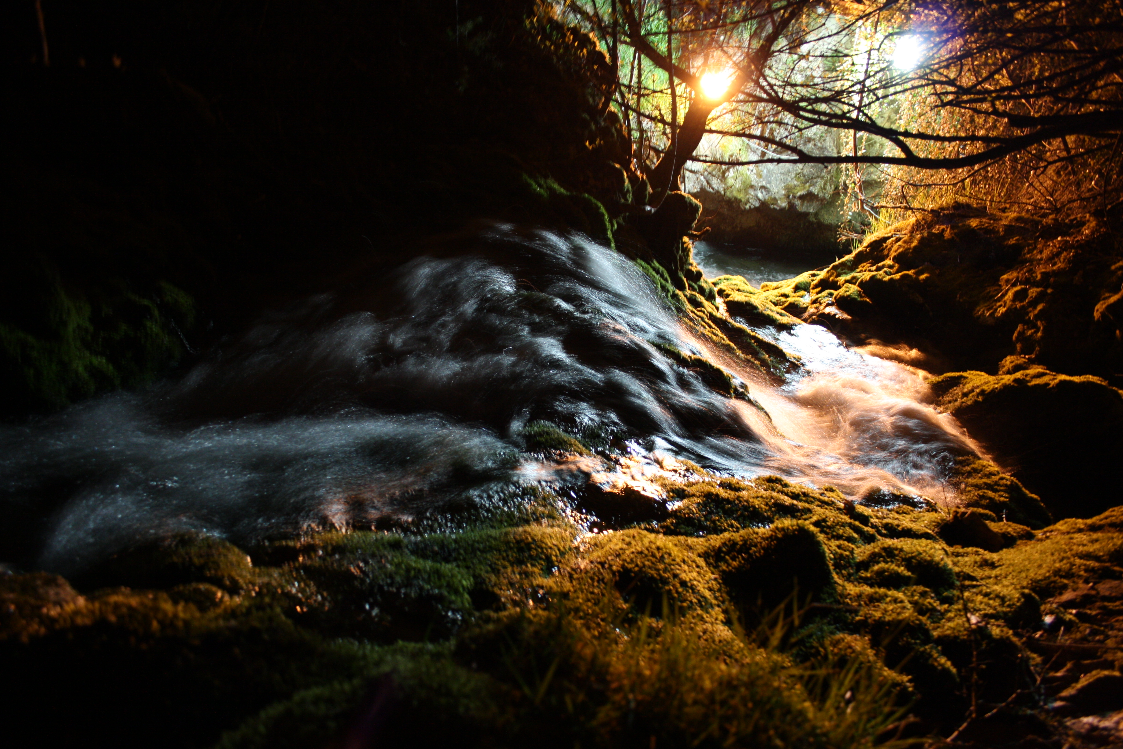 Vevcani